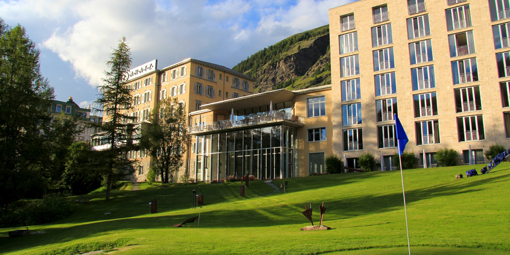 Das Areal rund um das Hotel ist 35'000 m2